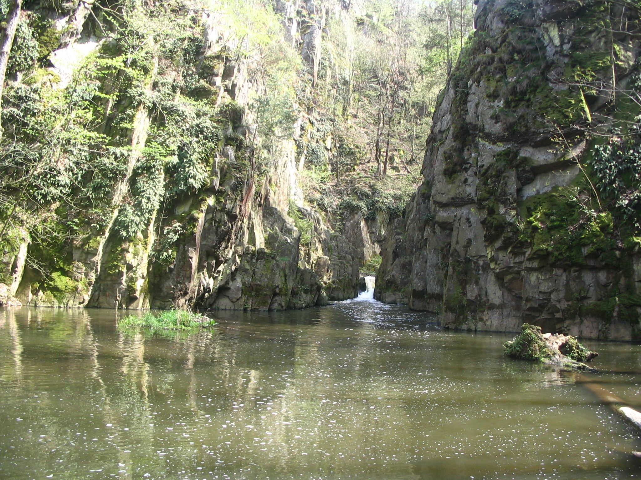 Skryjská jezírka